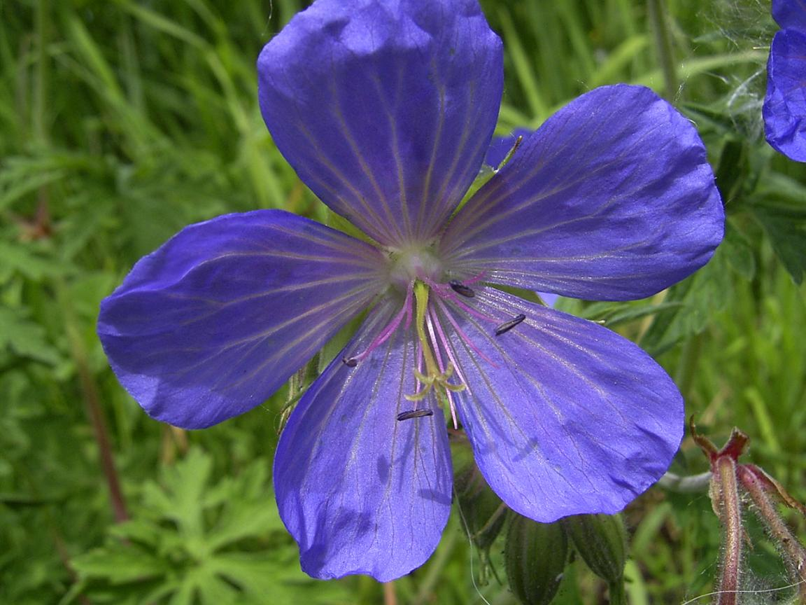 Gouda, bedrijventerrein Goudse poort, juni 2004